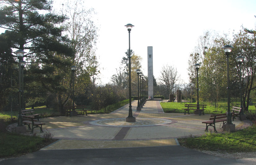 Park u središtu Jakovlja i spomenik NOB-u i poginulim braniteljima u Domovinskom ratu